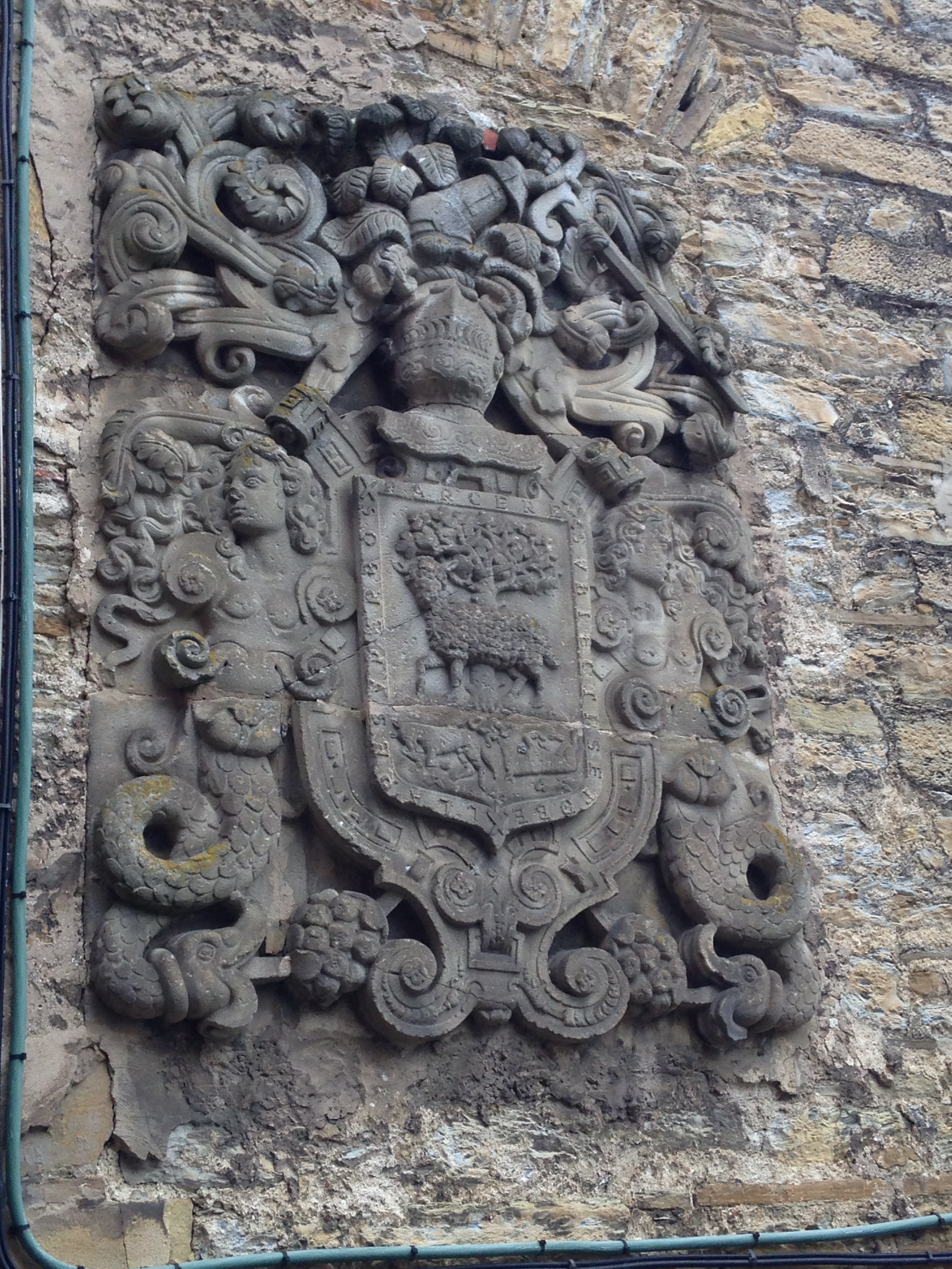 Escudo de los Iñarra en el palacio de Aldatze en Eibar (Gipuzkoa) País Vasco (España).